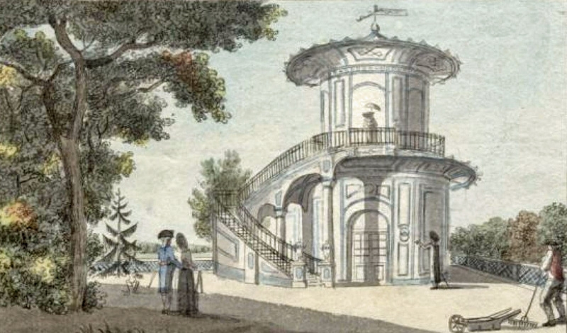 Der Japanische Pavillon in Richters Garten in Leipzig